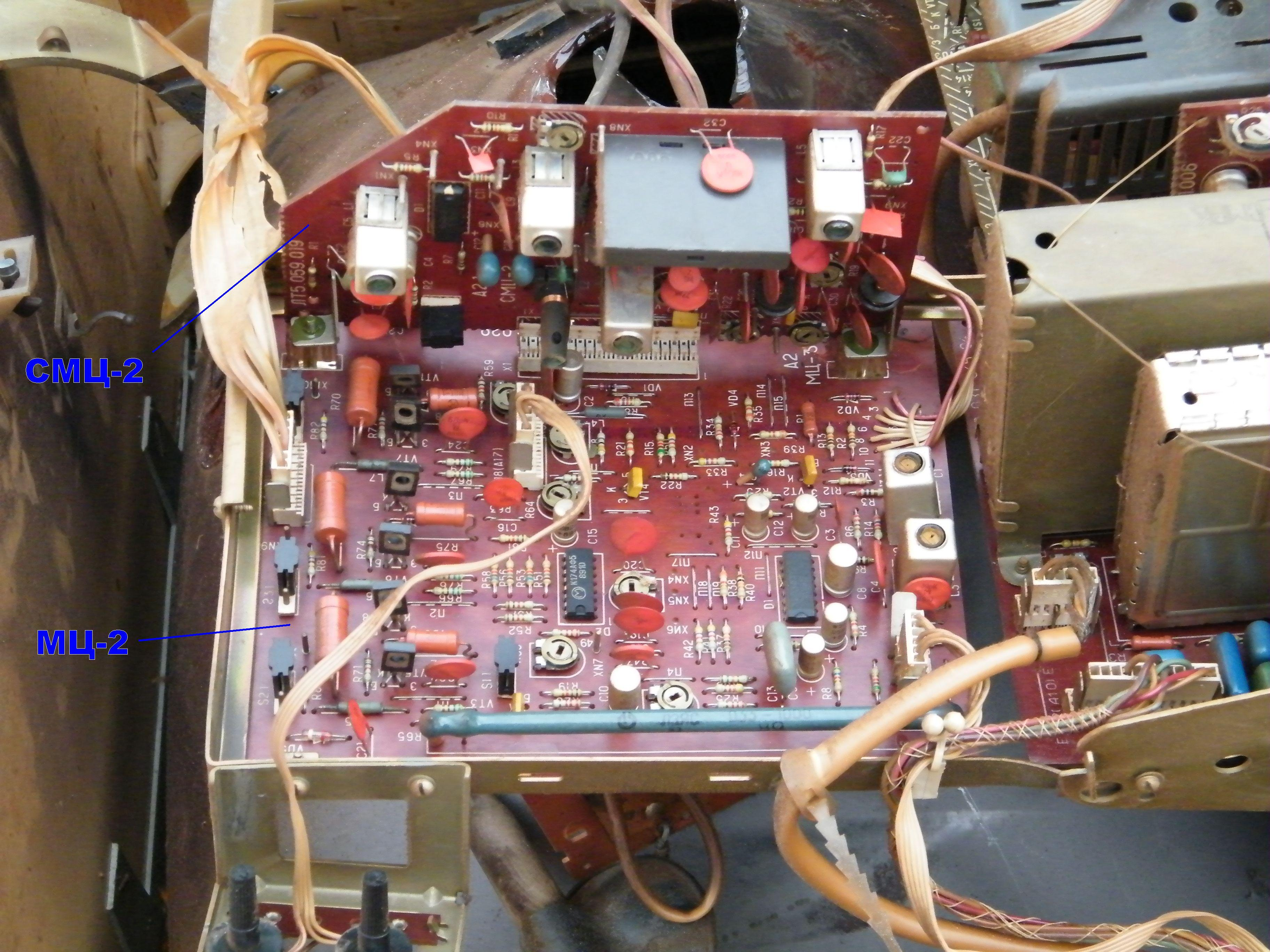 Модули СМЦ-2 и МЦ-2 телевизора 3УСЦТ